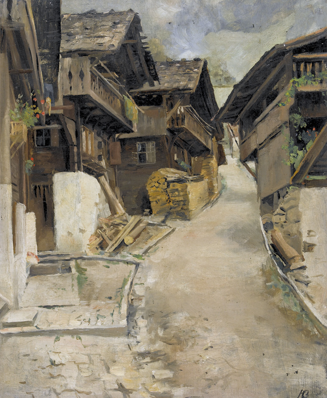 Gemälde von Hans Bachmann. Titel: "Strasse in Brienz". Öl auf Malkarton, verso auf Etikett betitelt, 40 x 32,5 cm, Motiv: Brunngasse in Brienz